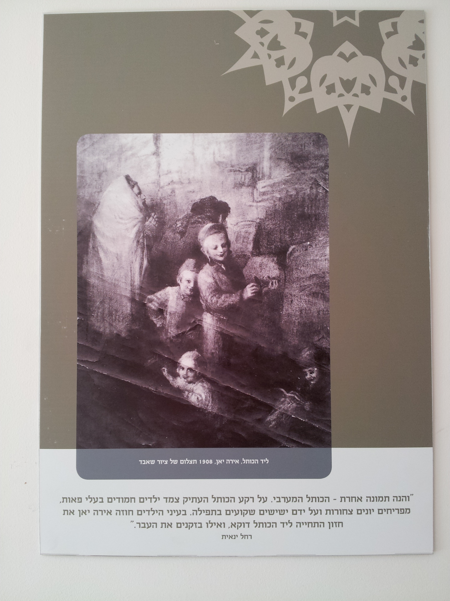 צילום של ציור של הציירת אירה יאן מאוספה של רחל ינאית בן צבי. מוצג בצריף הנשיא